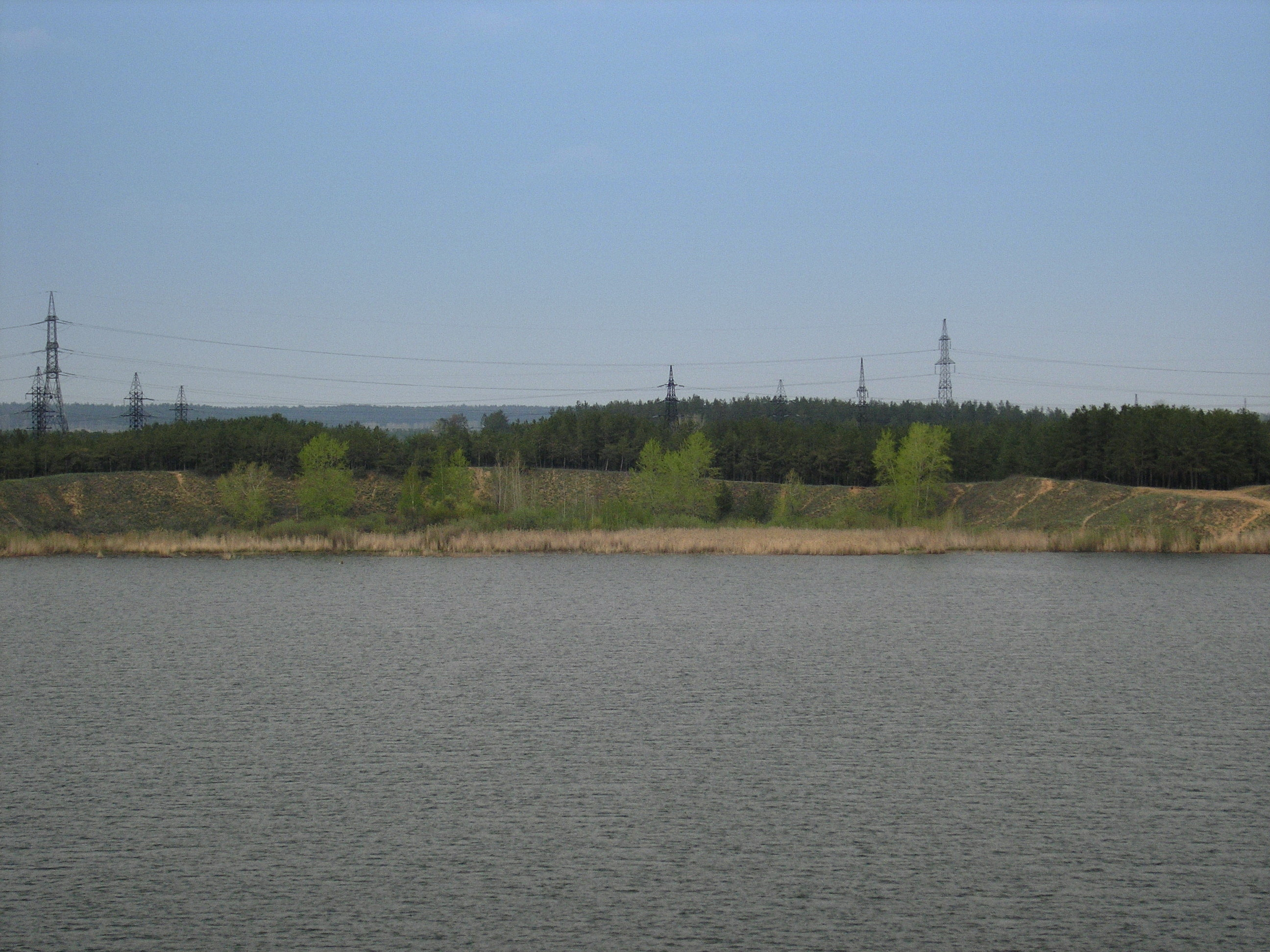 Озеро Пляжное, Тольятти, Россия